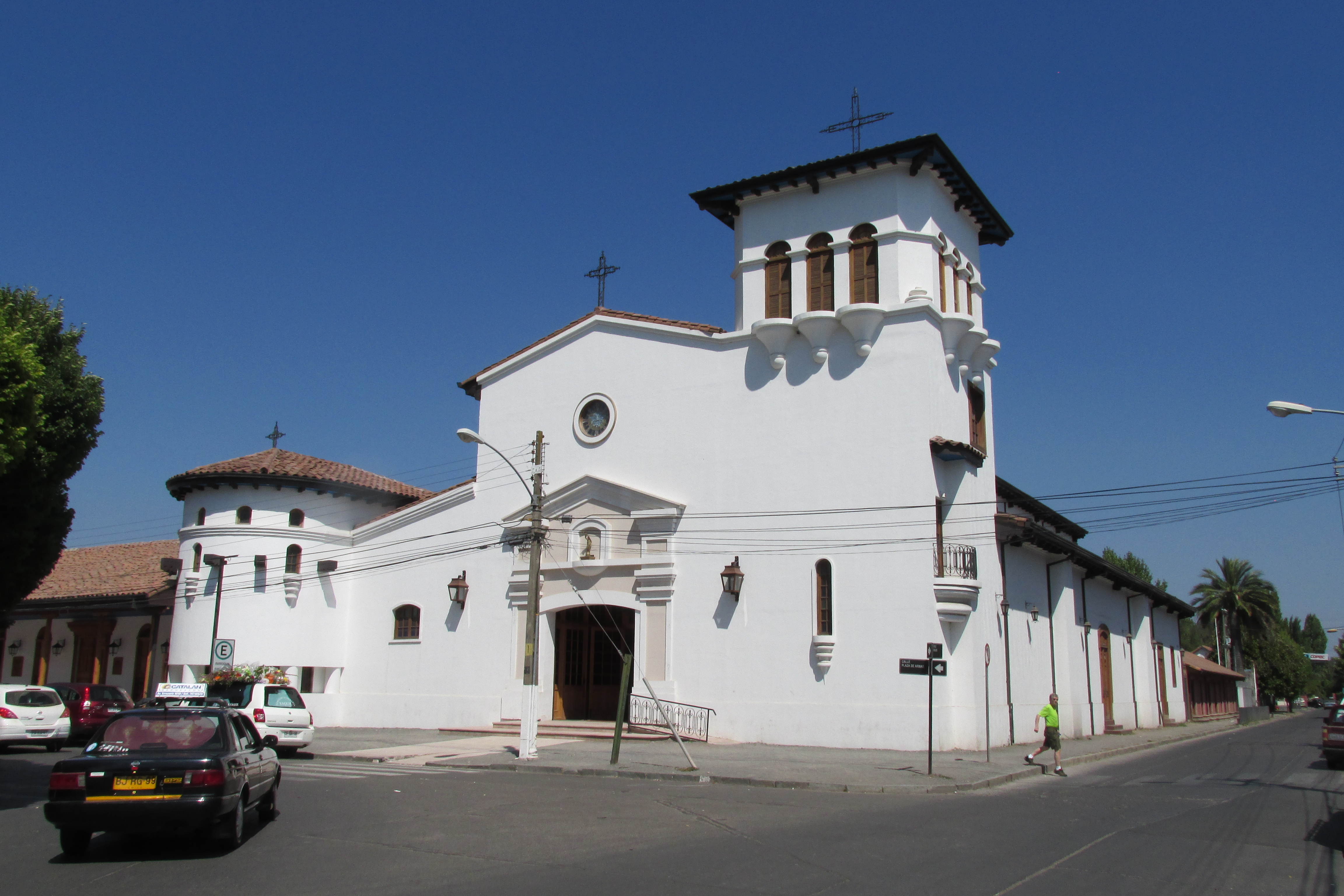 Frontis Iglesia La Santa Cruz de Colchagua, restaurada despues del terremoto del 27 Febrero 2010 en la Sexta Región Chile